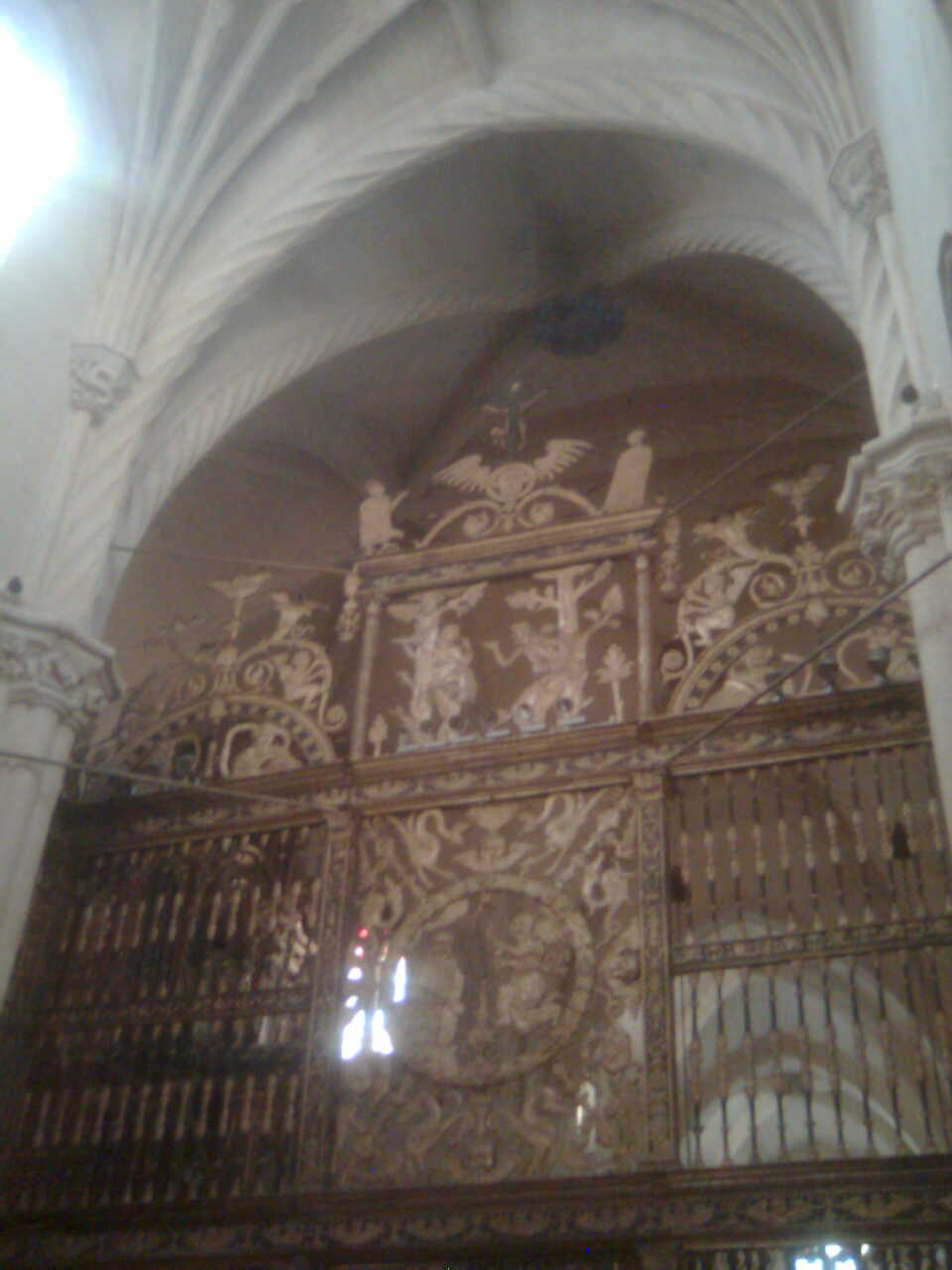 Rejería de la catedral de Orihuela